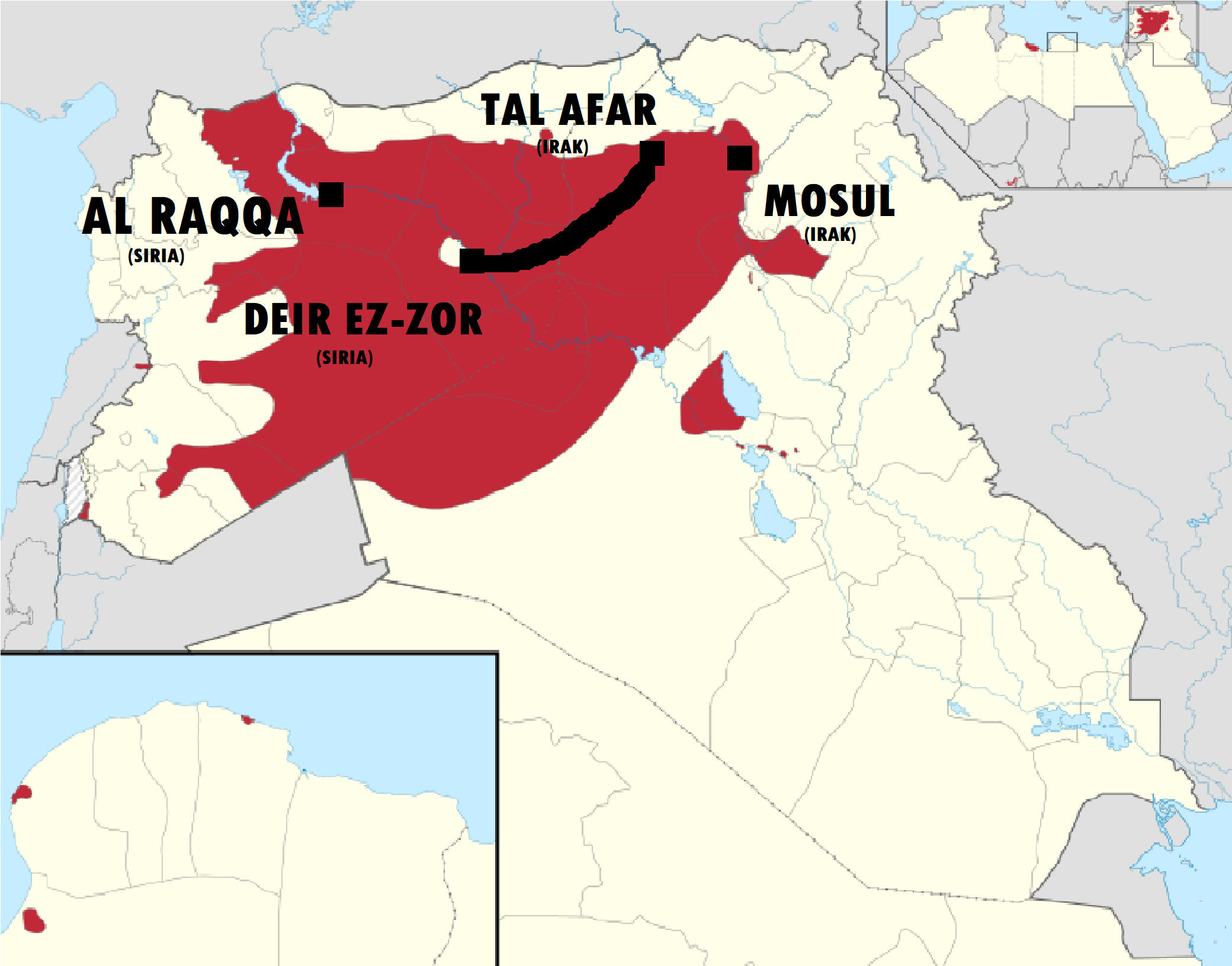 Camino de fuga yihadista entre Tal Afar en Irak y Deir ez-Zor en Siria